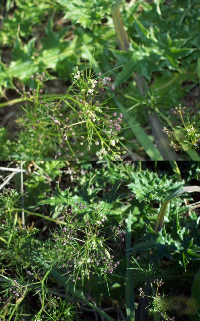 Cyclospermum leptophyllum var. leptophyllum. Apiaceae. Fotos tomadas en el predio de la Facultad de Agronomía en Sayago, departamento de Montevideo y en pradera arcillosa al margen del Río Negro cerca del dique de la Represa Constitución en Palmar, departamento de Soriano, Uruguay.